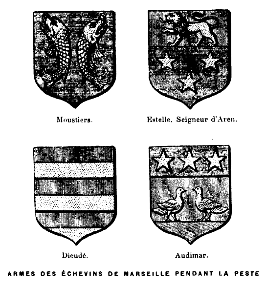 Armes des Echevins de Marseille pendant la Peste de 1720